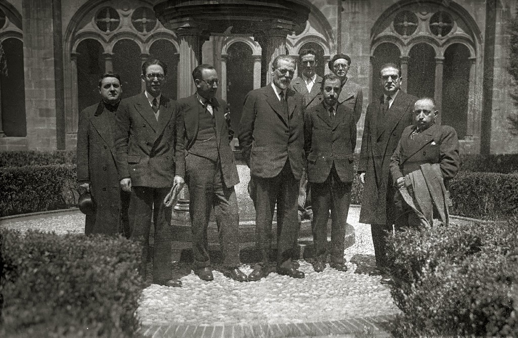 Título original: Diferentes personalidades en el claustro de San Telmo, entre ellos se encuentra José de Ariztimuño Olaso 'Aitzol' (1/1) Localización: San Sebastián (Guipúzcoa)